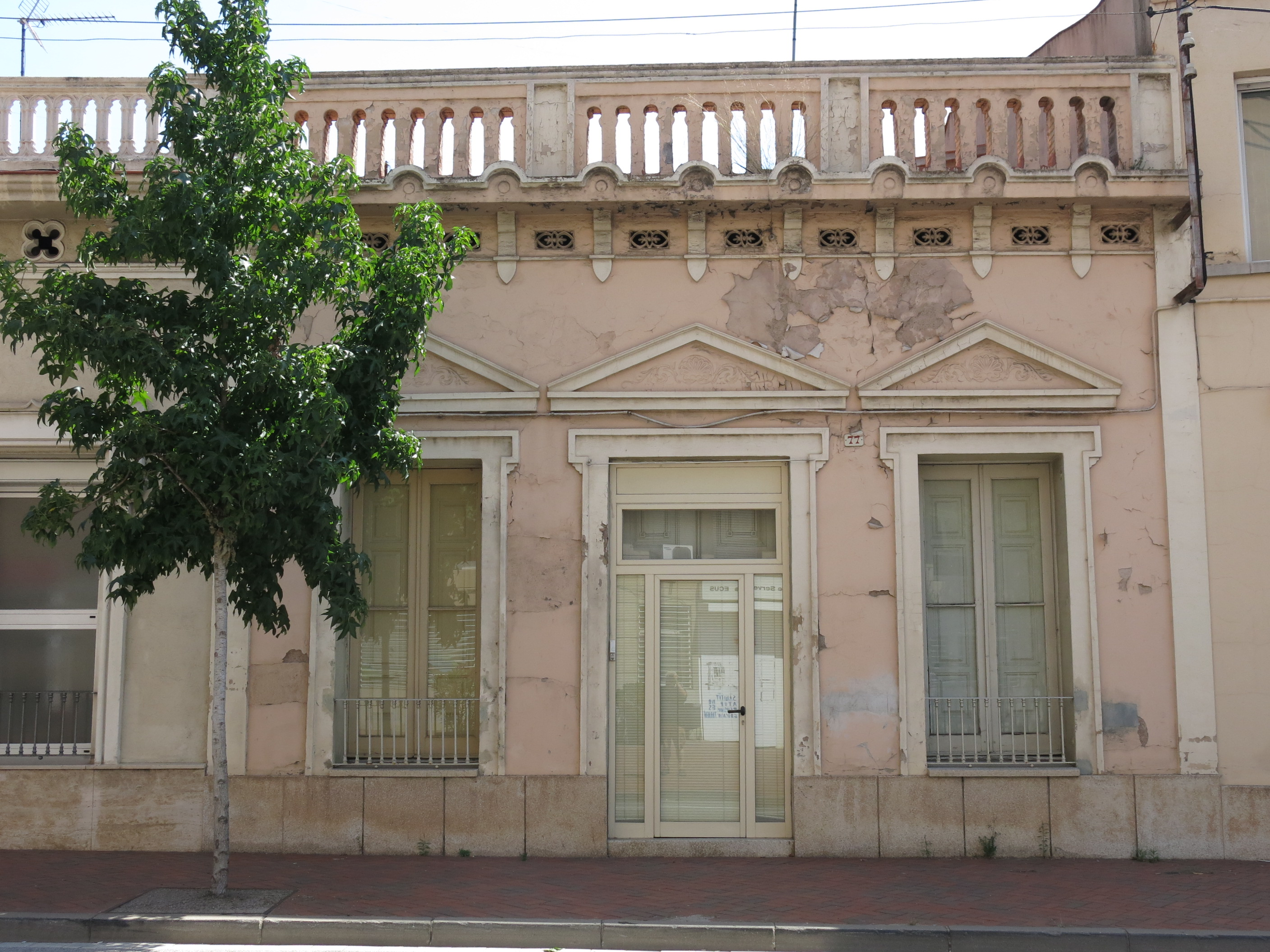 Habitatge al passeig Anselm Clavé, 77 (Sentmenat)